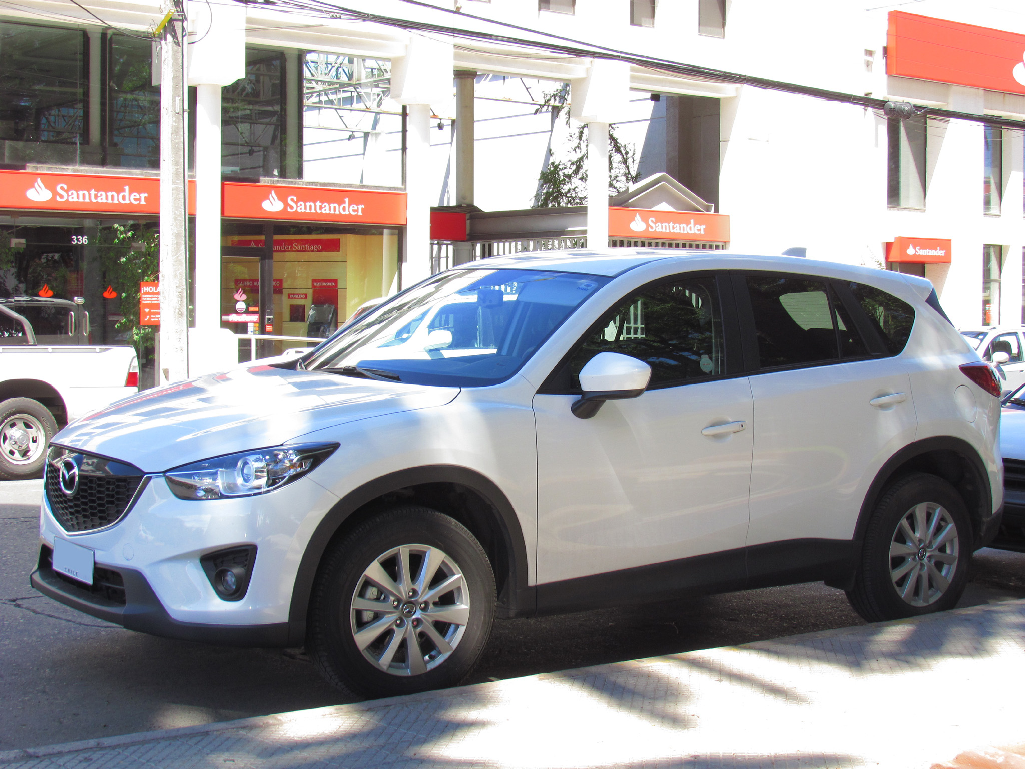 Mazda CX-5 2.0R 2013